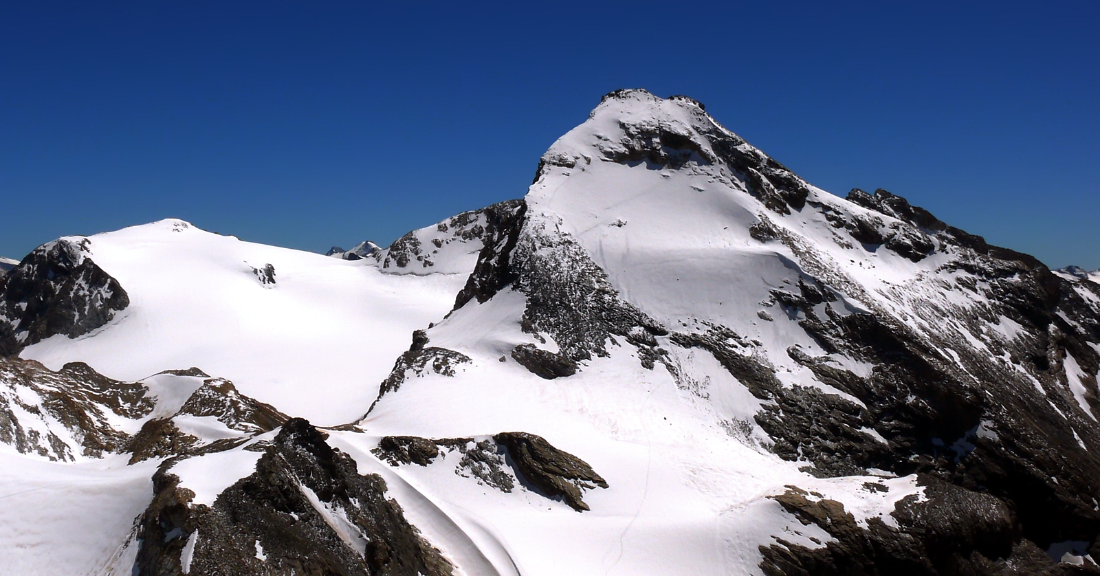 D:\WIKI\Tsanteleina 01.jpg - Alpi Graie - Italy